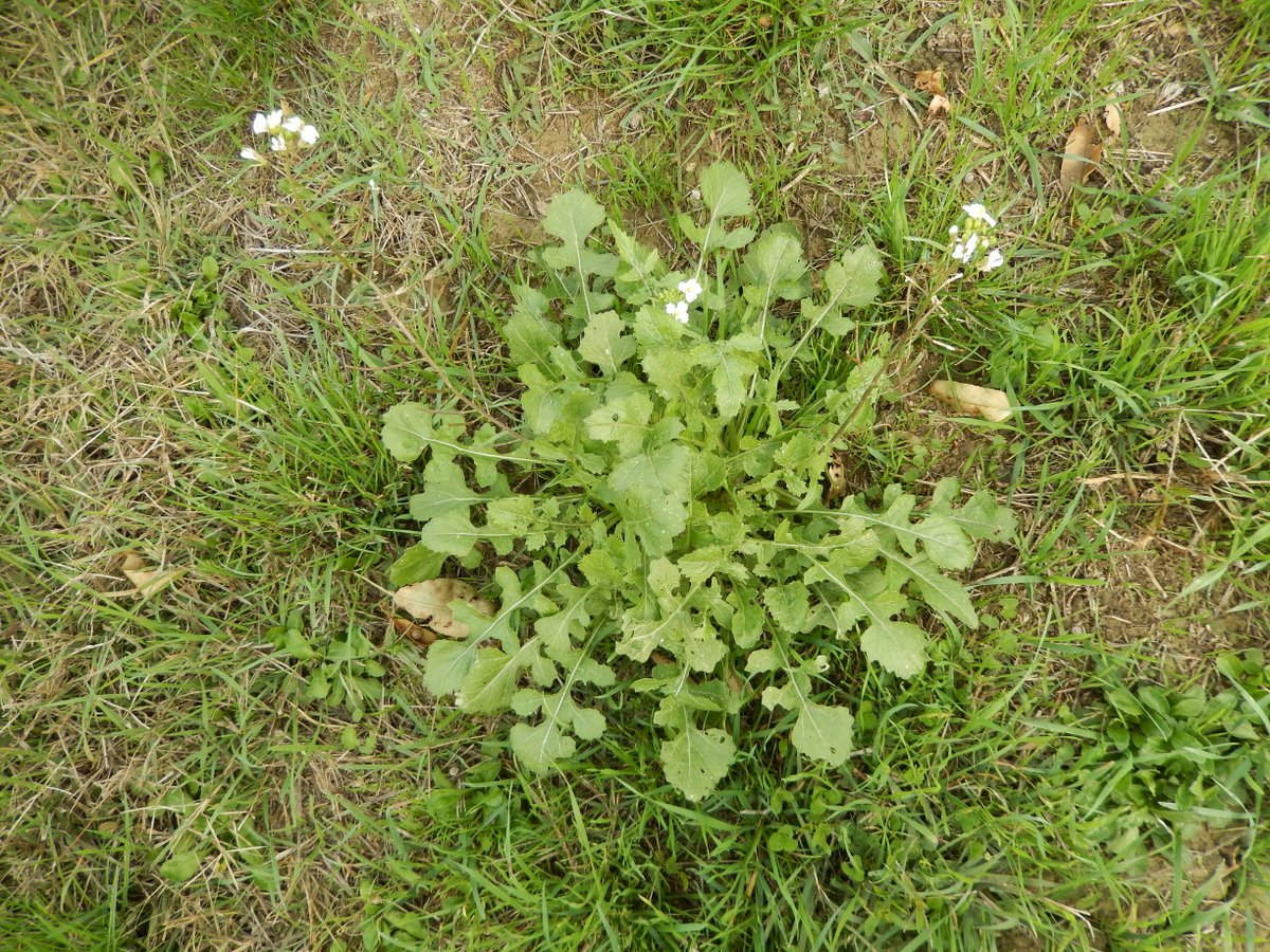 Diplotaxis erucoides (L.) DC. - determinata dall'autore della foto - rosetta